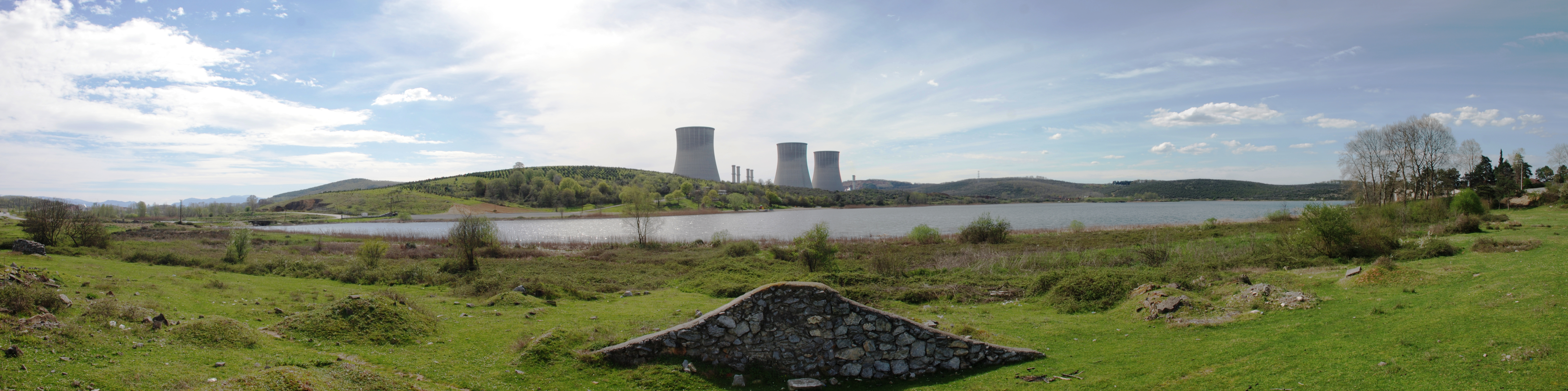 Sakarya Taşkısığı Gölü ve Enka Adapazarı doğalgaz çevrim santrali.